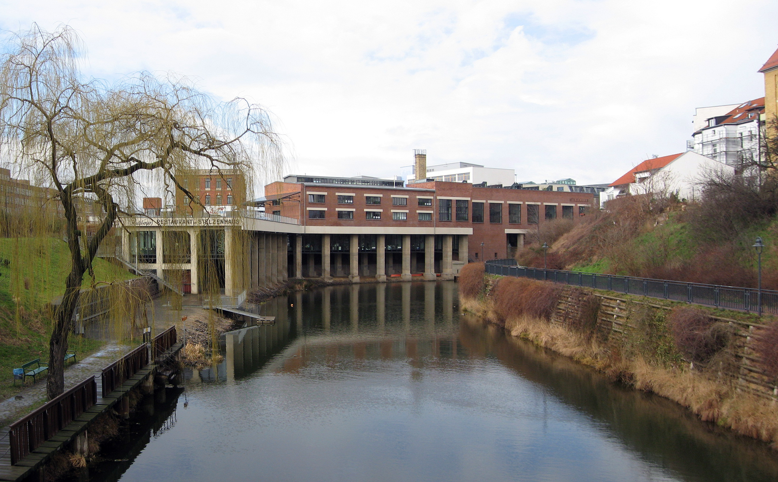 Stelzenhaus in Leipzig-Plagwitz (erbaut 1937–1939), Ansicht vom Karl-Heine-Bogen (Fußgängerbrücke) über den Karl-Heine-Kanal (aus Richtung Osten; Fotomontage mehrerer Aufnahmepositionen)